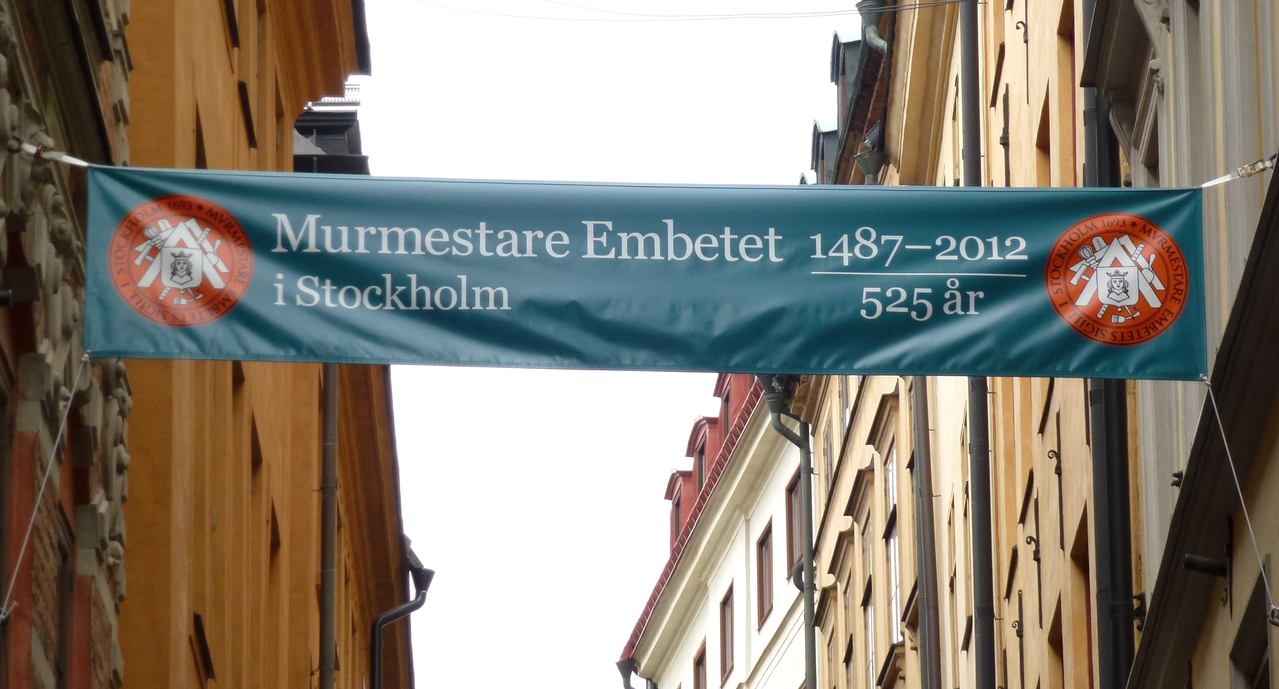 Bandaroll: Murmestare Embetet 1487-2012